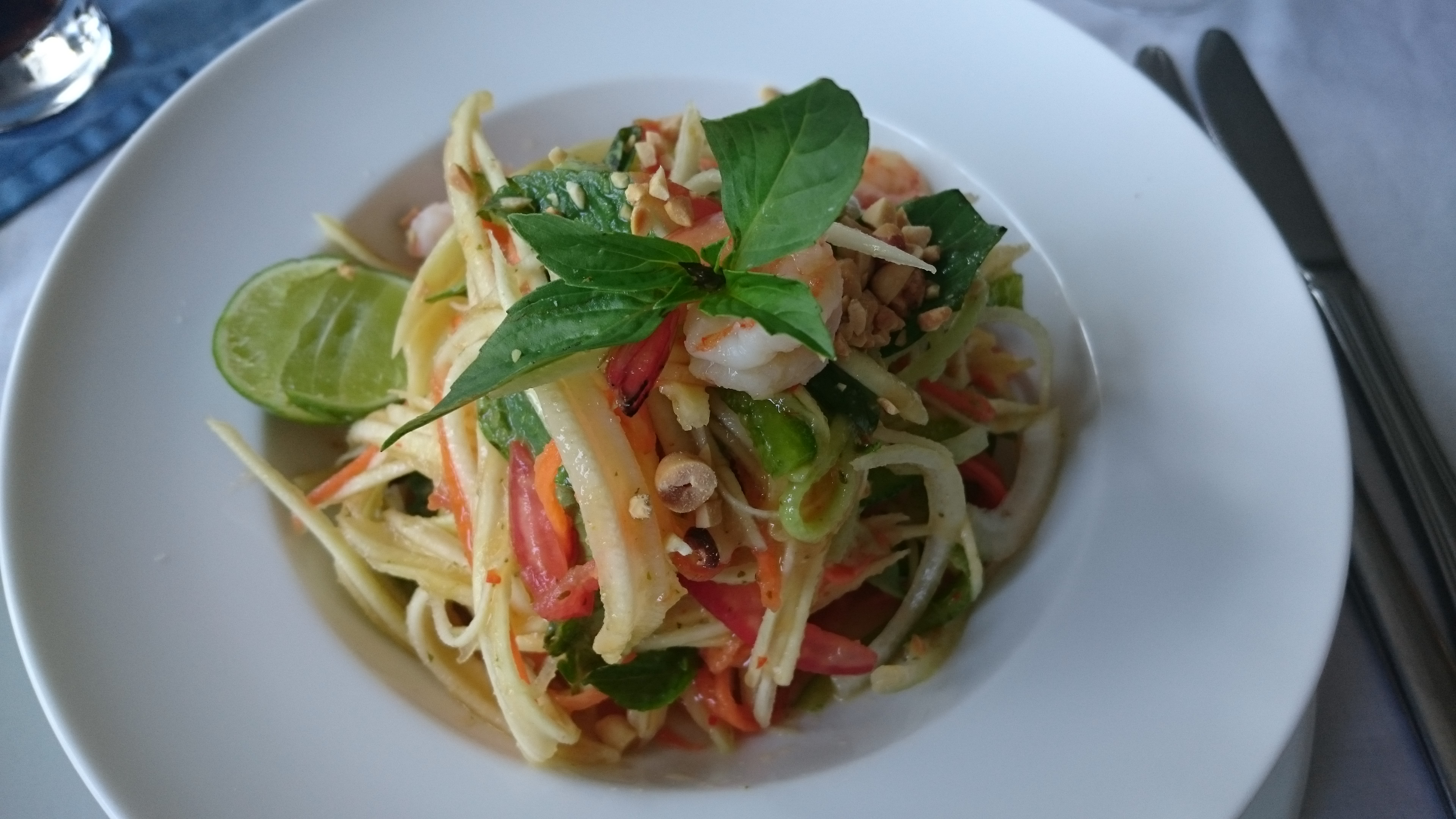 Siem Reap, Cambodia.